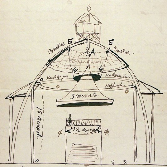 Эскиз здания панорамы «Бородино» на Чистых прудах